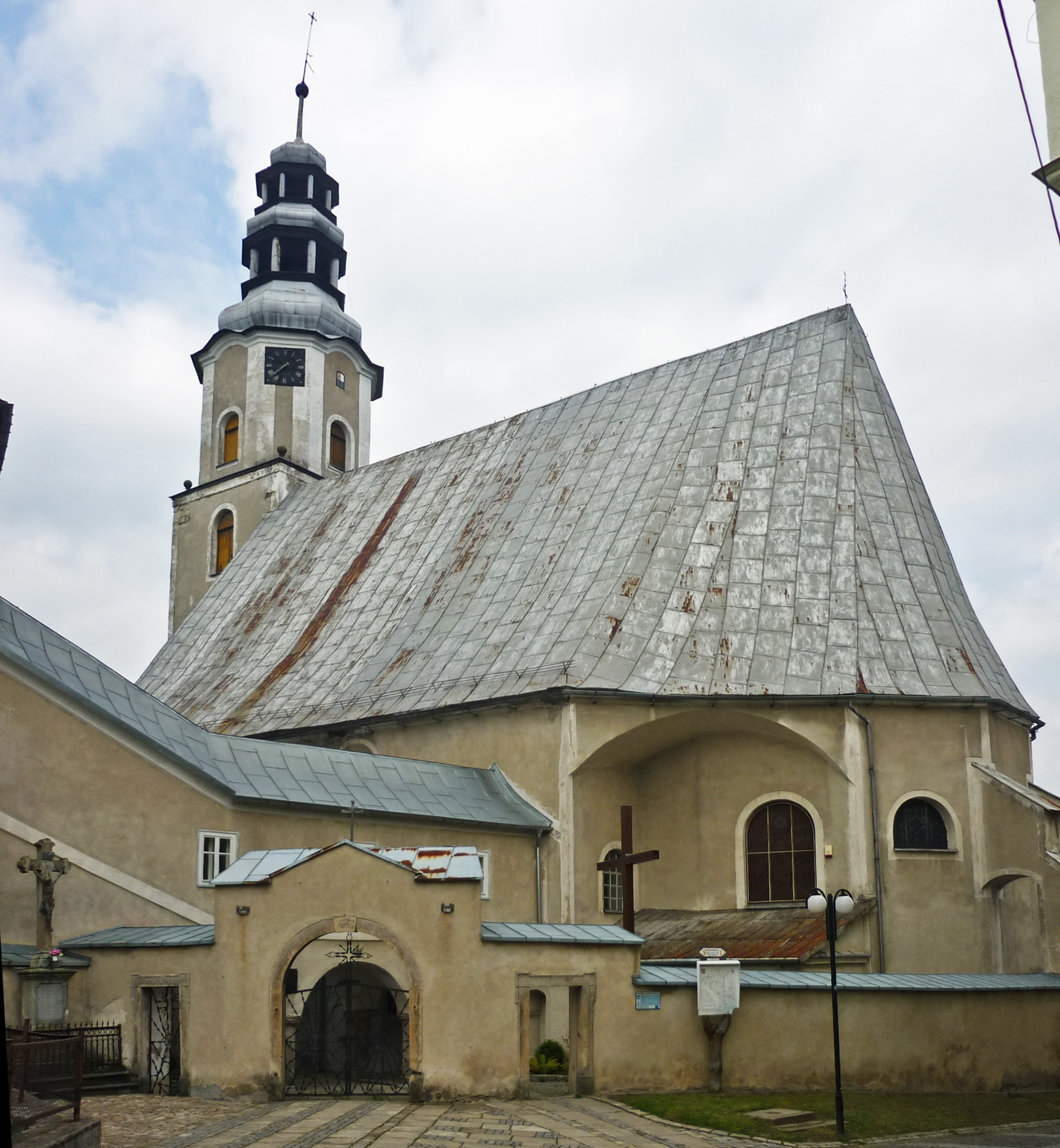 Corpus-Christi-Kirche in Międzylesie (Mittelwalde im Glatzer Bergland)